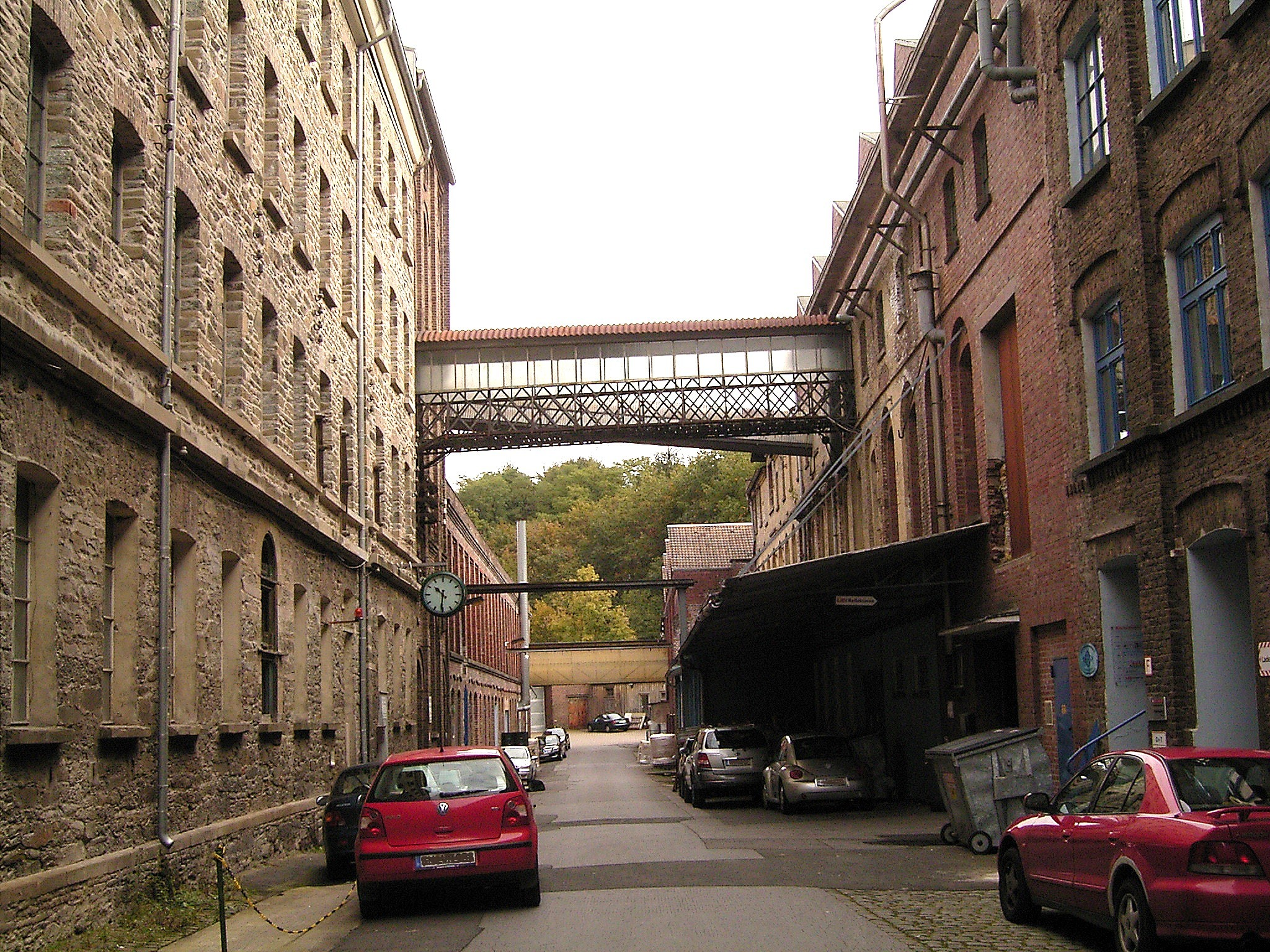 Radevormwald